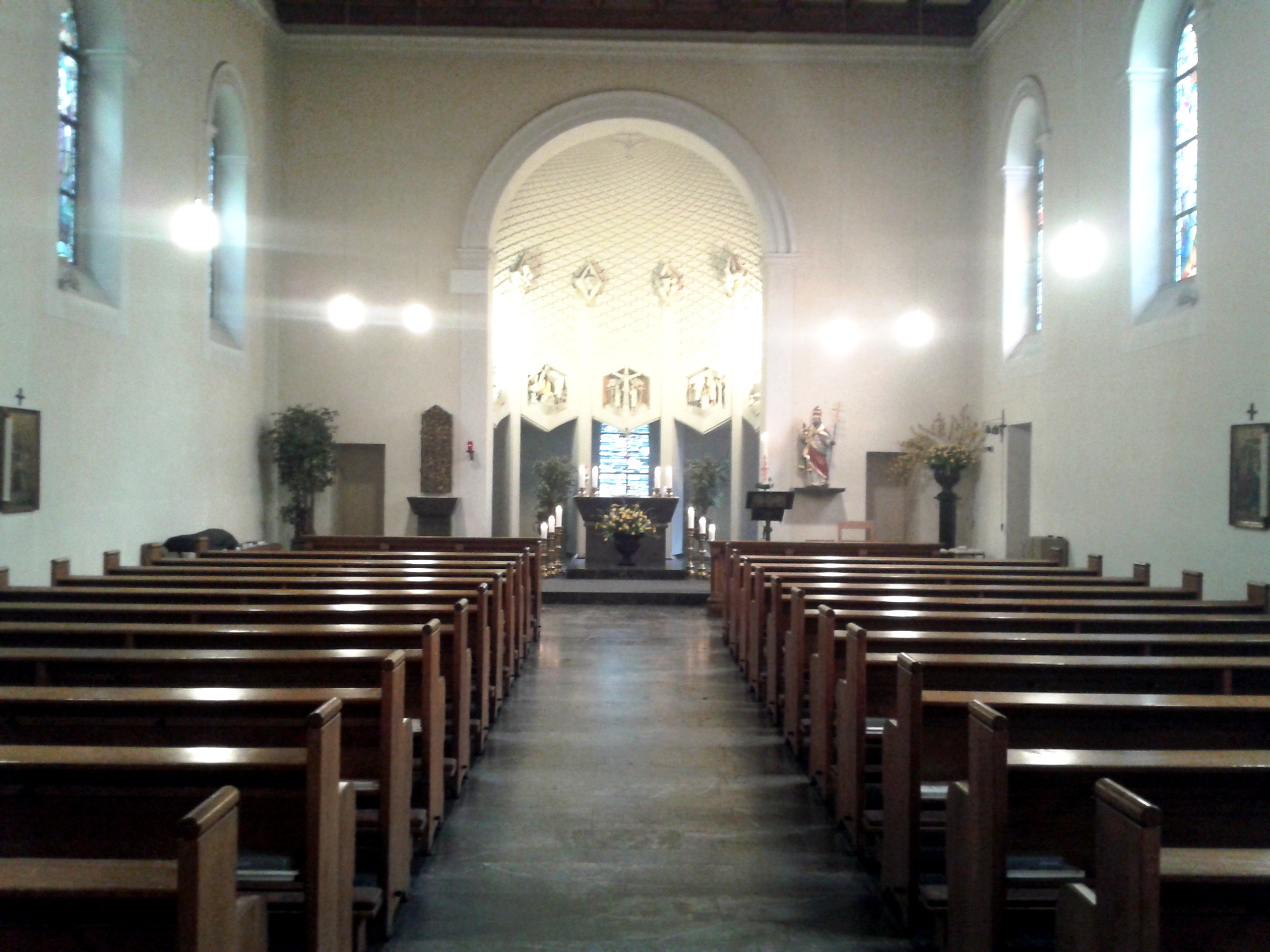 Innenraum der kath. Pfarrkirche St. Cornelius, Köln-Heumar